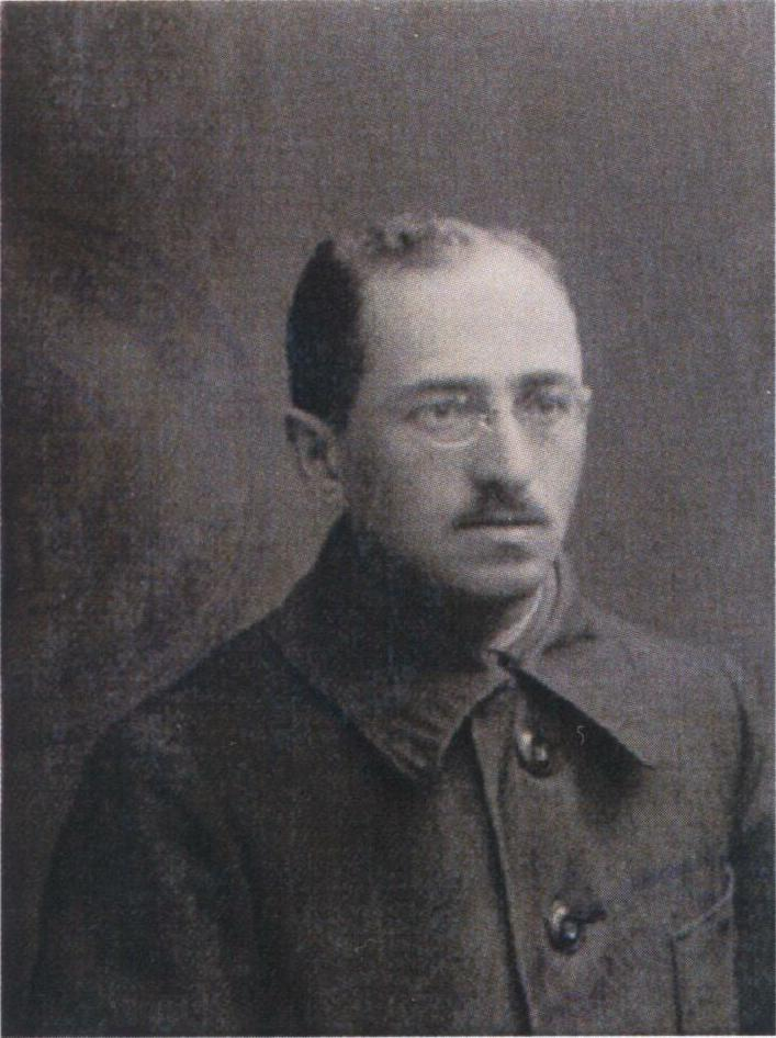 Bronisław Taraszkiewicz, działacz białoruski, poseł na Sejm RP